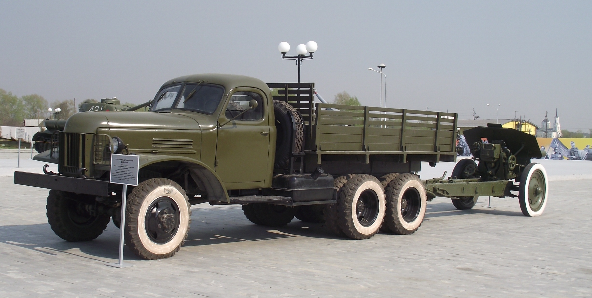 ZIS-151 military truck in museum, Verkhnyaya Pyshma, Sverdlovskaya Oblast, Russia